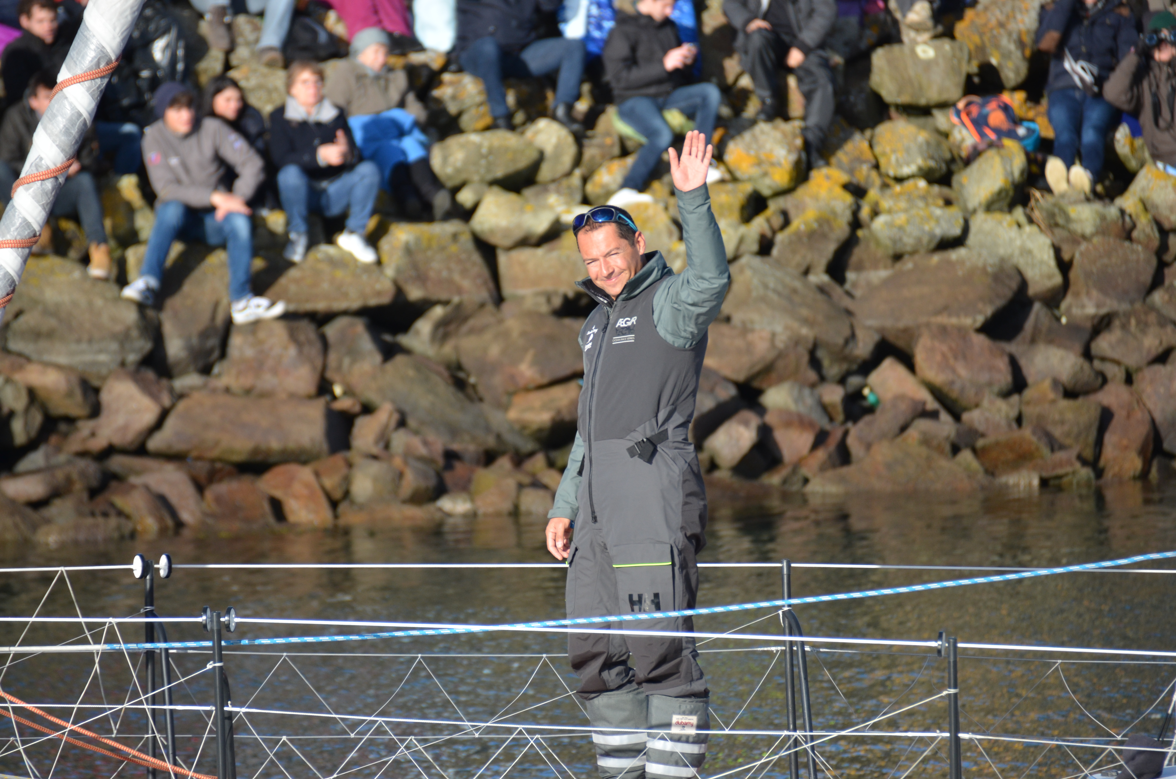 Romain Attanasio au départ du Vendée Globe 2016-2017